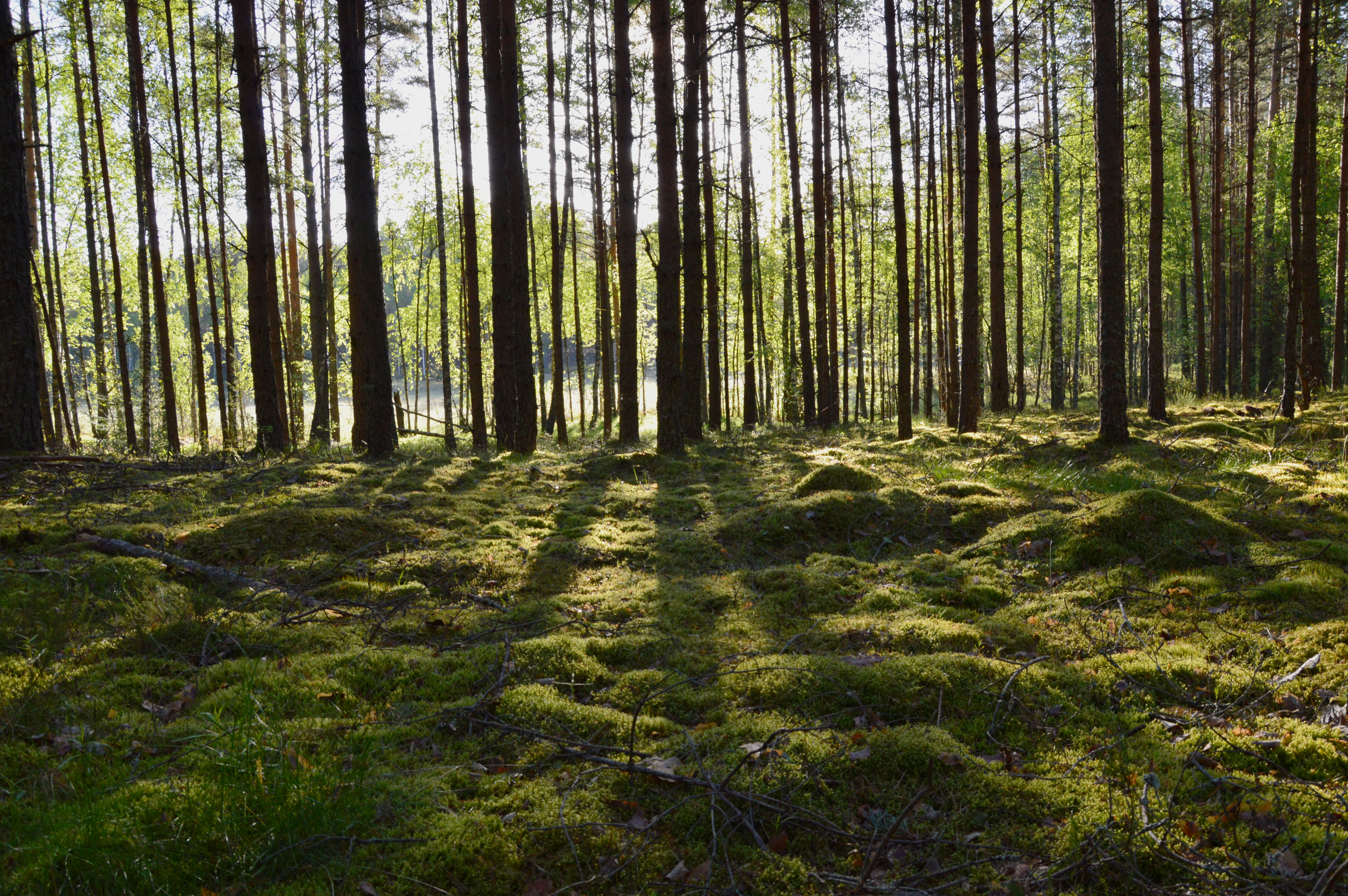 Mustoja maastikukaitseala.